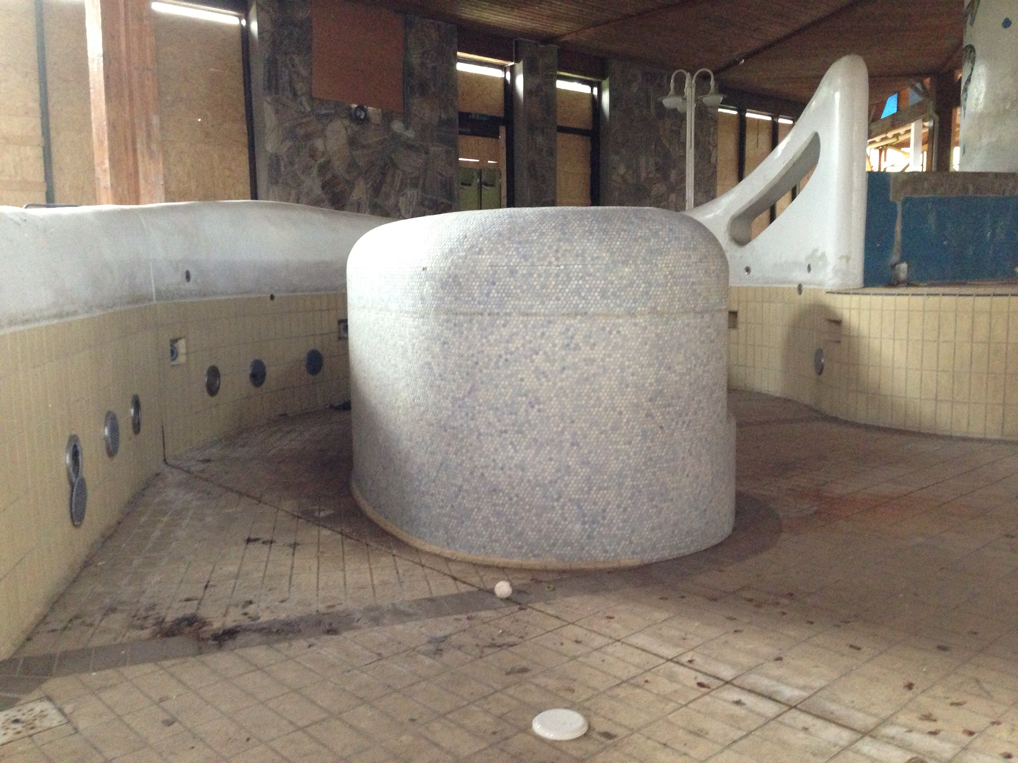 Berliner Luft- und Badeparadies im Jahr 2013